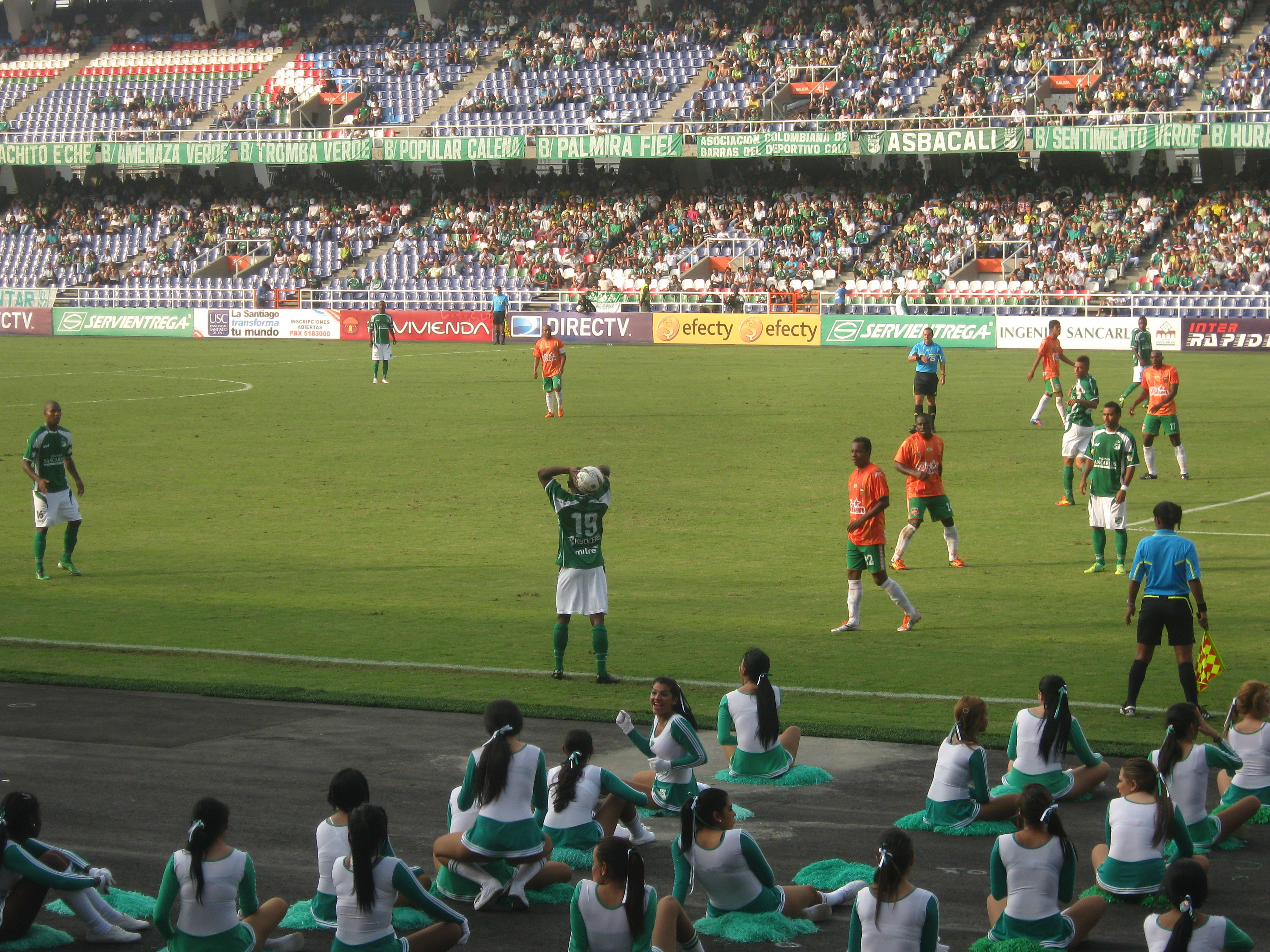 Partido del Deportivo Cali|Deportivo Cali contra Envigado por la fecha 14 de la Liga Postobon 2012-1